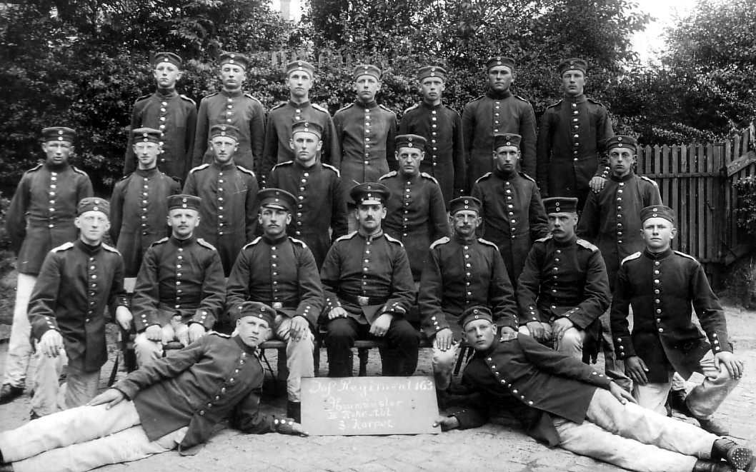 Auf der Tafel steht: Infanterie-Regiment 163 / Neumünster / III. R.Kr.Abt. (III. Rekruten-Abteilung) / 3. Korpor. (3. Korporalschaft)